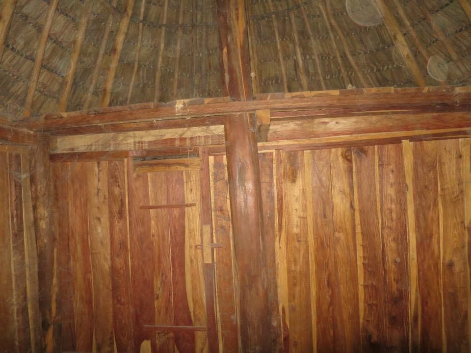 Im Dorf Biacou, Suco Aidabaleten